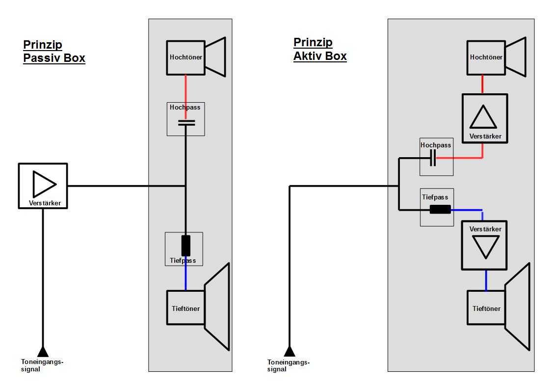 Gegenüberstellung einer Passiv-Lautsprecherbox zur Aktiv-Lautsprecherbox